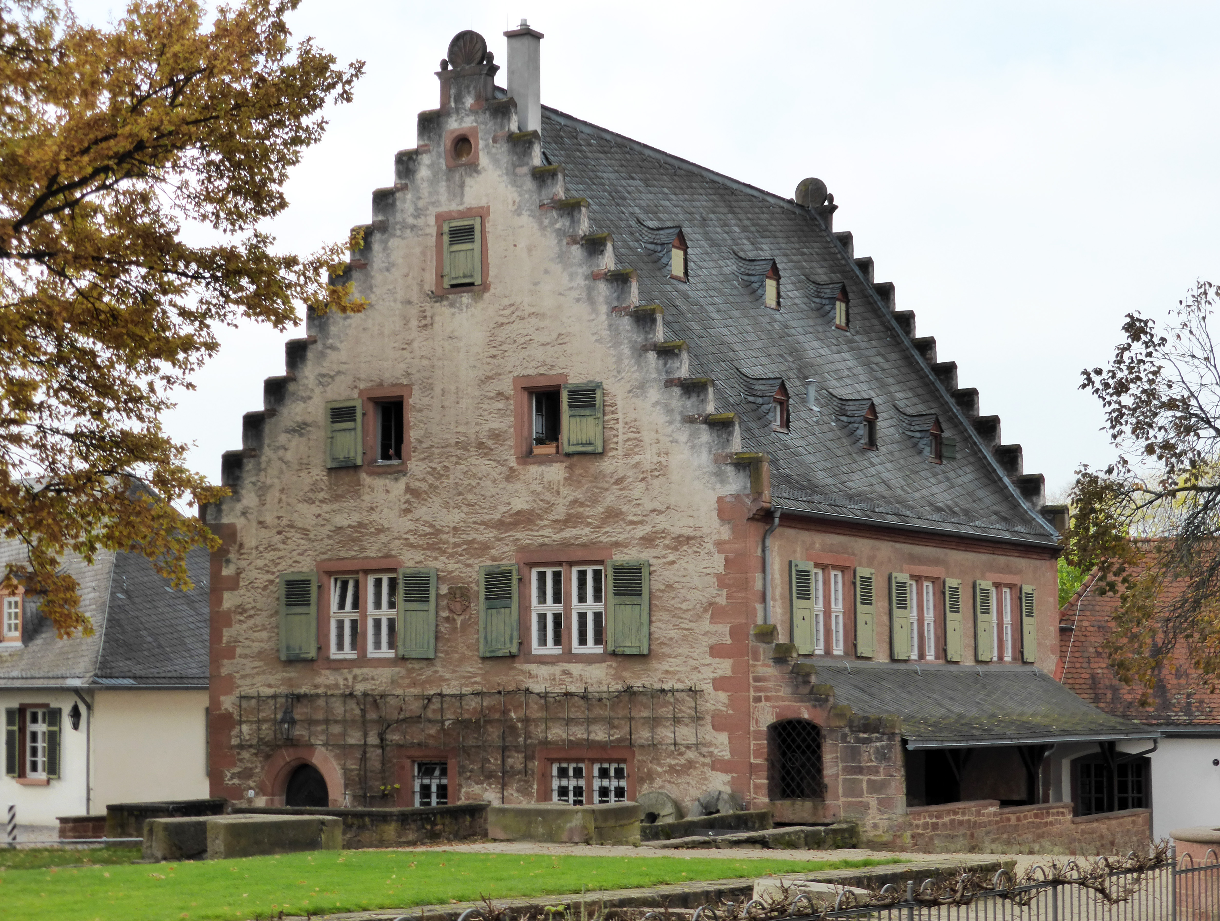 Kloster Seligenstadt, Klostermühle von 1574.